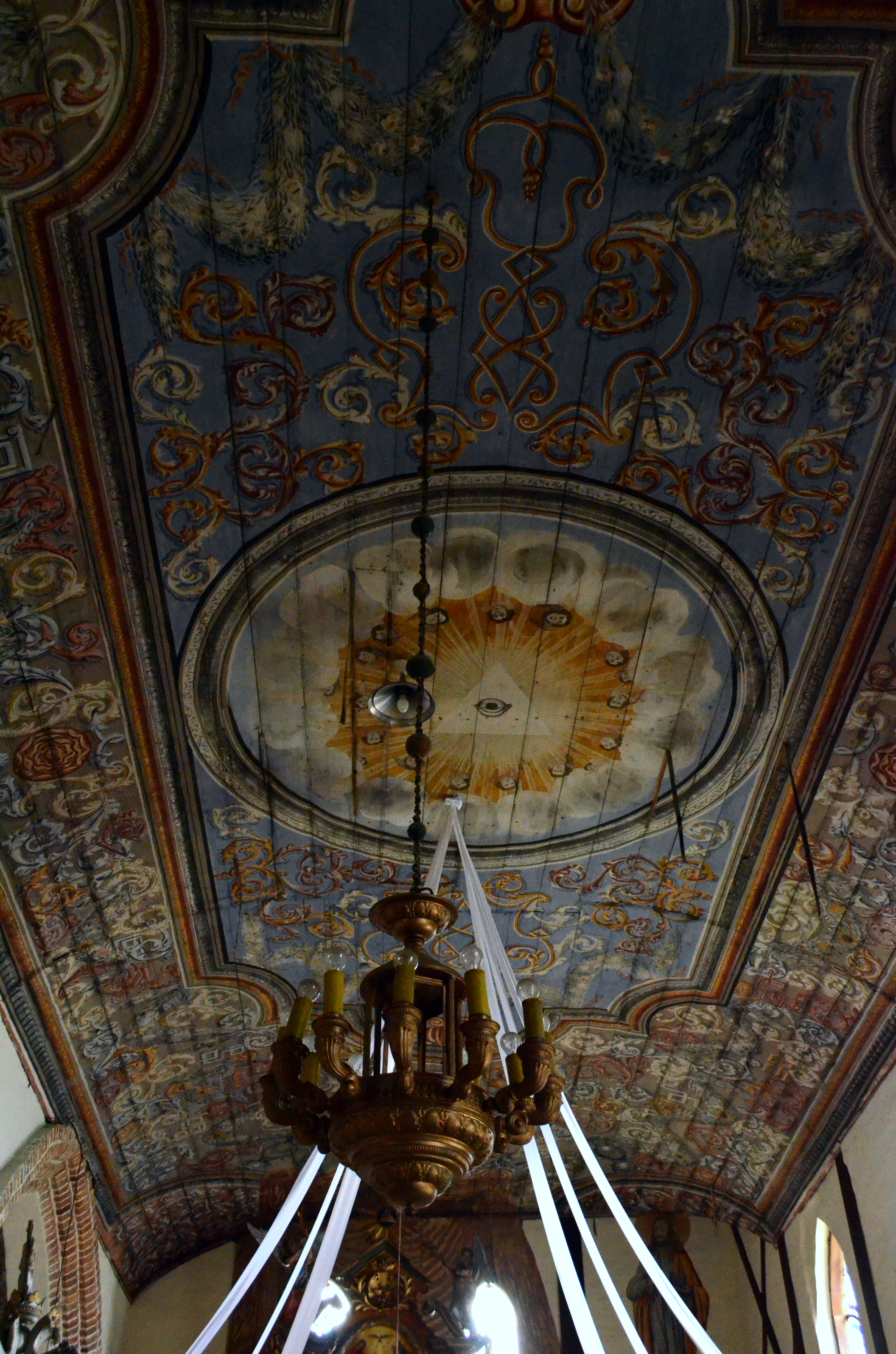 Groß Montau: Deckenbemalung in der Dorfkirche